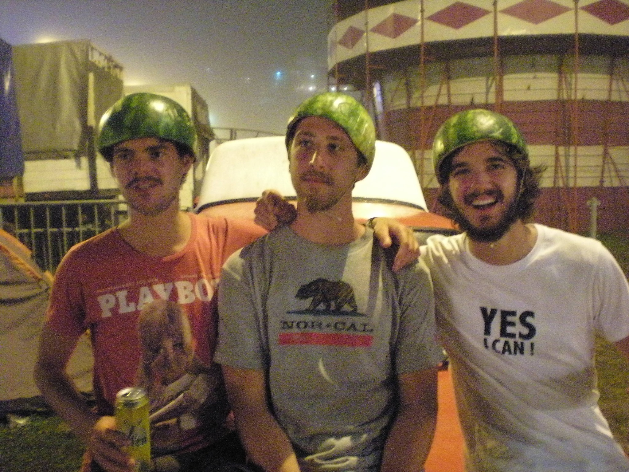 Festivaliers du Guča Festival 2014